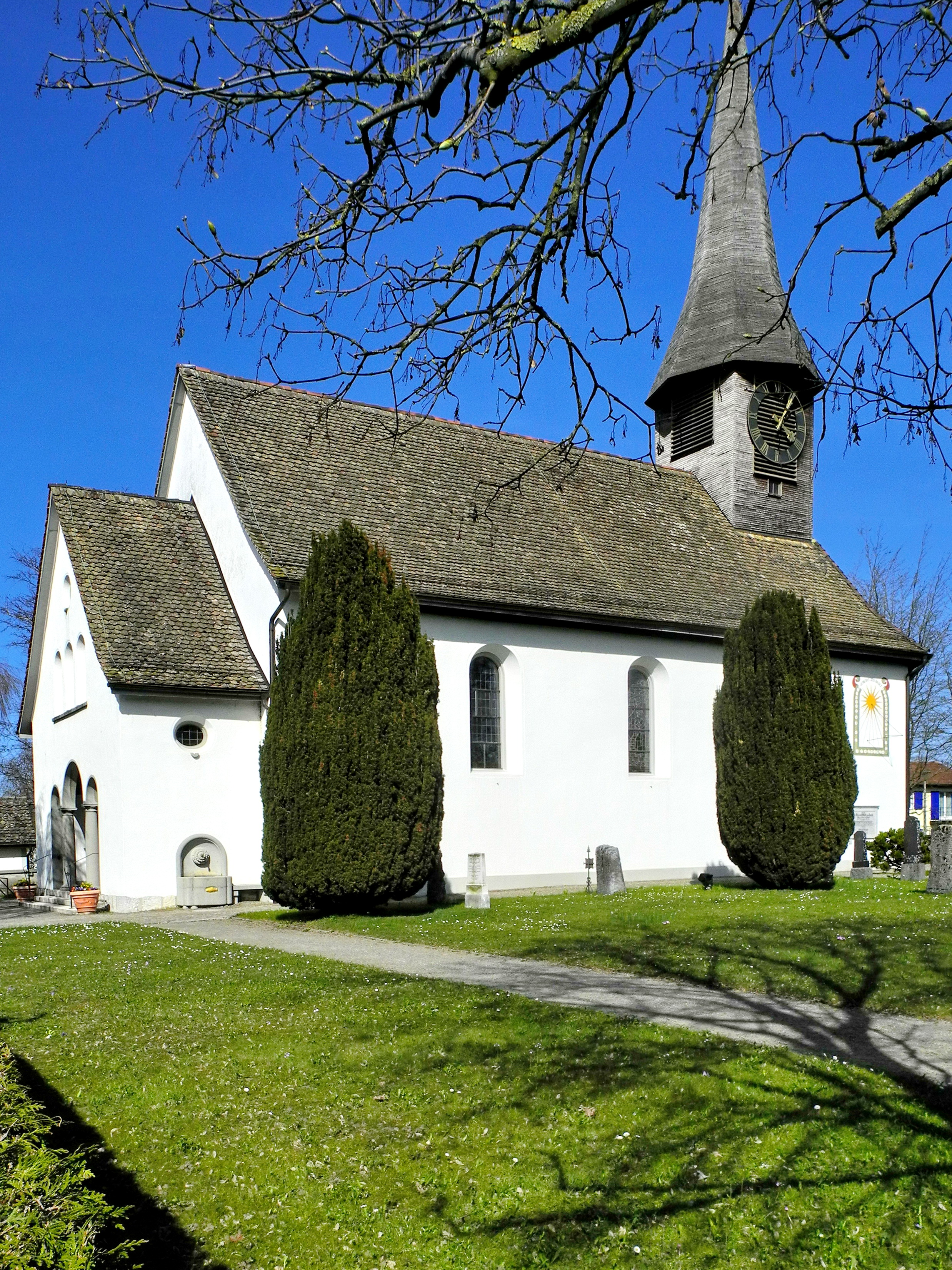 Reformierte Kirche in Zürich-Unteraffoltern (Switzerland)